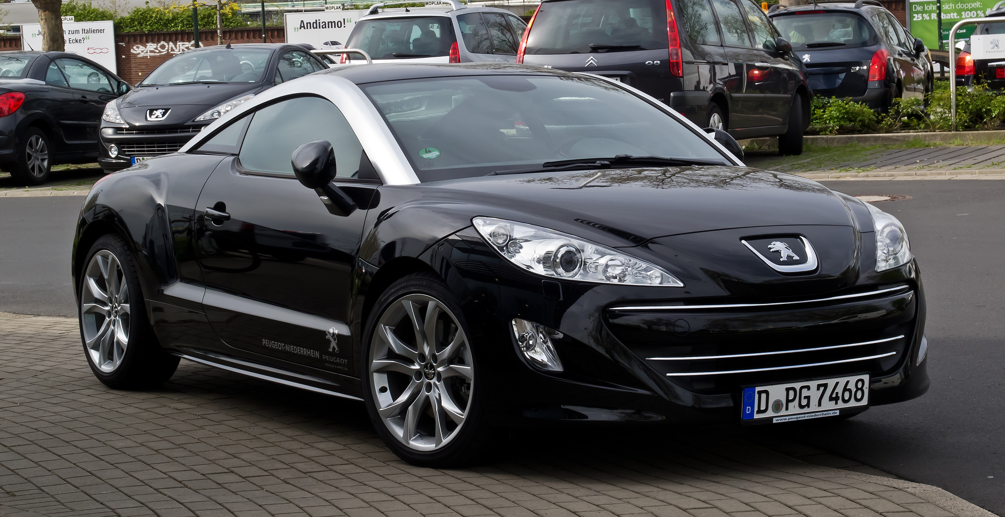 Peugeot RCZ HDi FAP 165